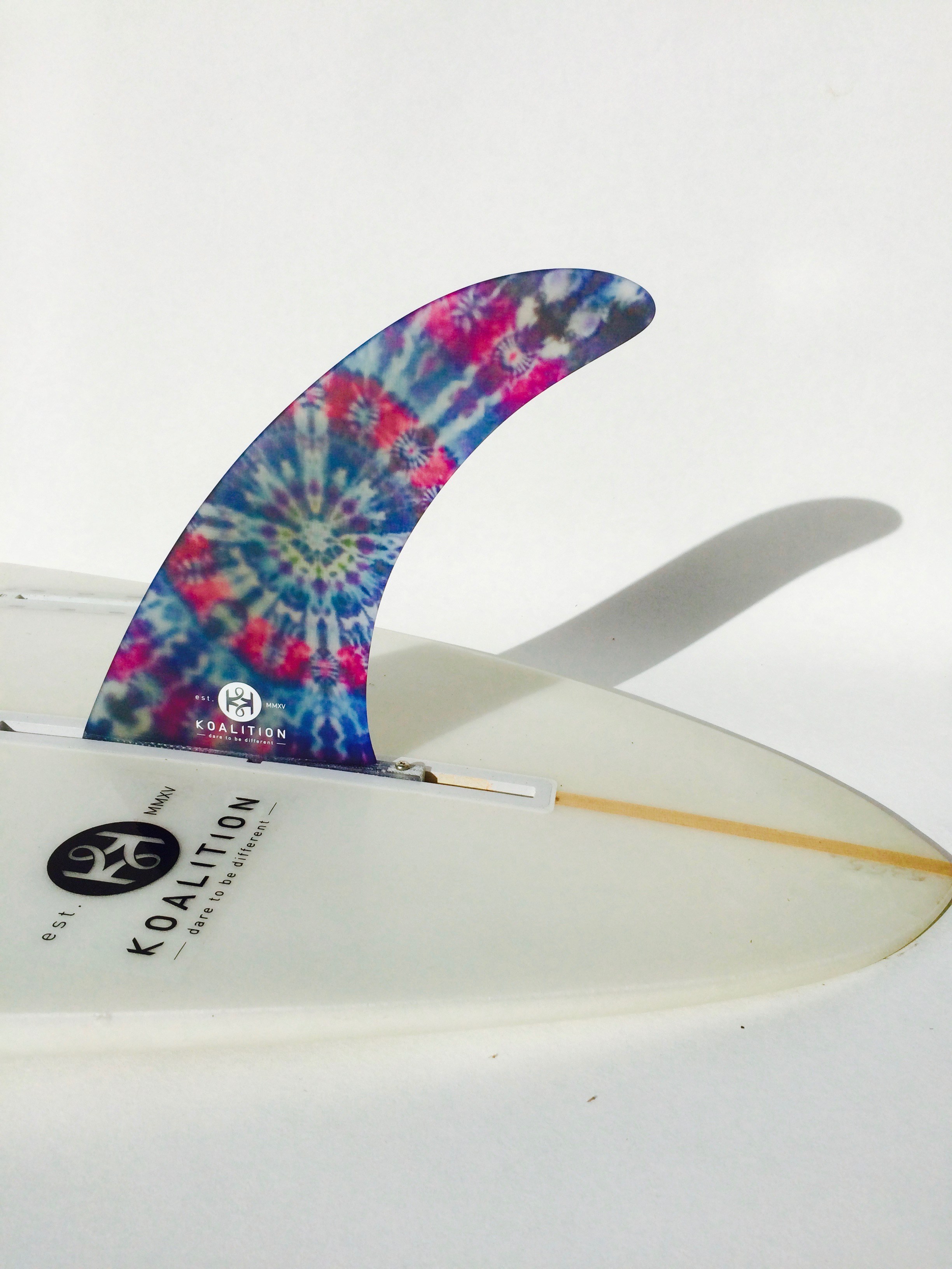 Dérive montée sur une planche de surf